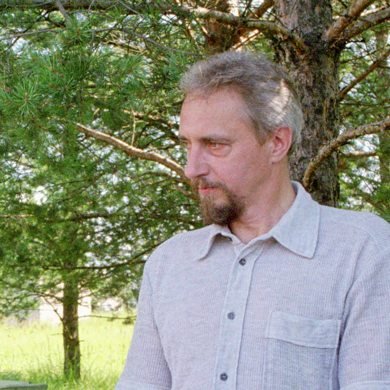 Павел Анатольевич Морозов, президент конно-спортивного клуба «Святово», член Русского экономического общества имени С. Ф. Шарапова.